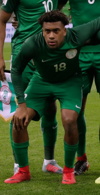 Nigeria national football team